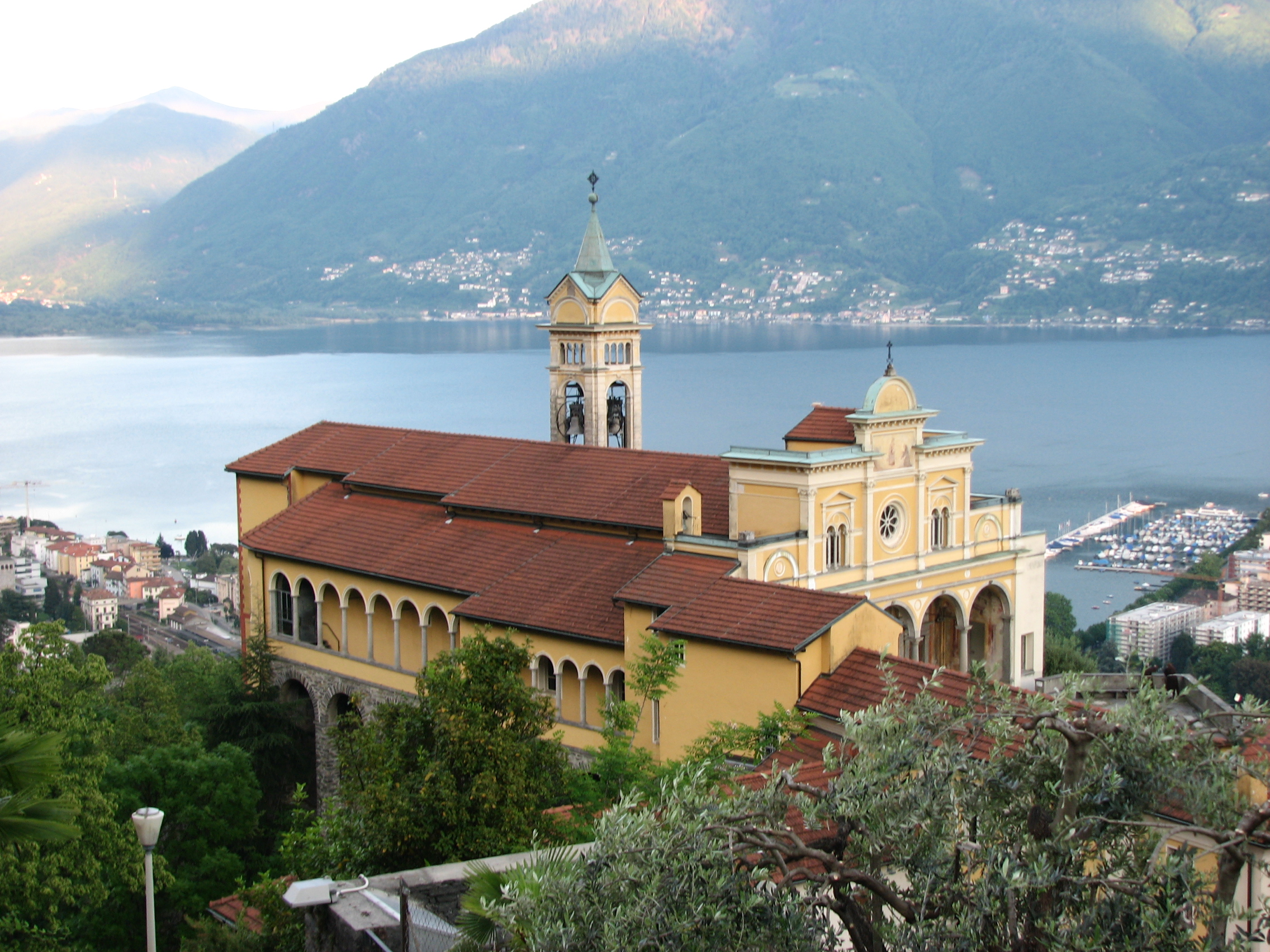 Madonna del Sasso sanctuary in Locarno